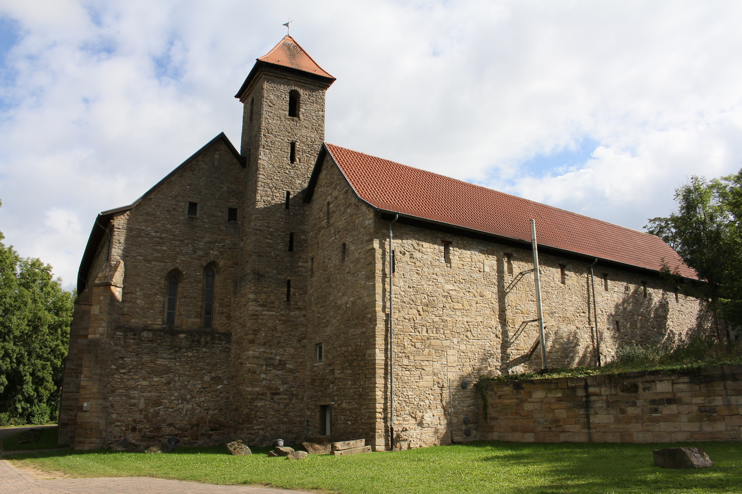 Kloster Cornberg, Hessen